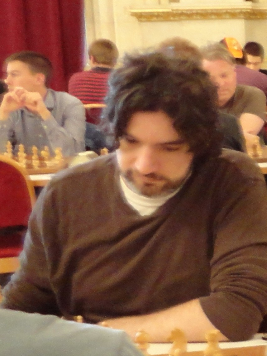 Thomas Bartell, Vienna Chess Open 2015 in Wien.